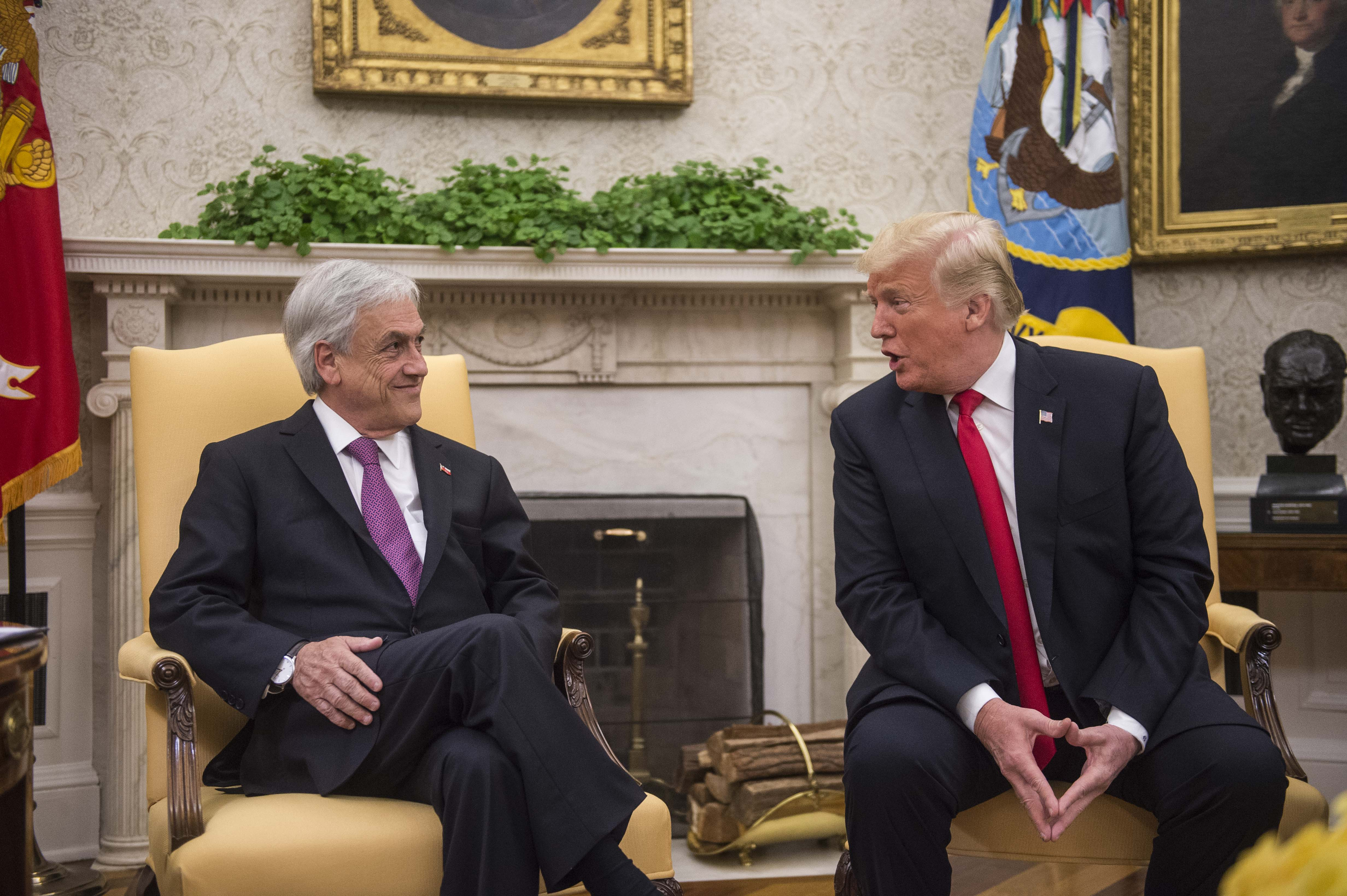 Presidente Piñera sostiene reunión con el Presidente Trump en la Casa Blanca.